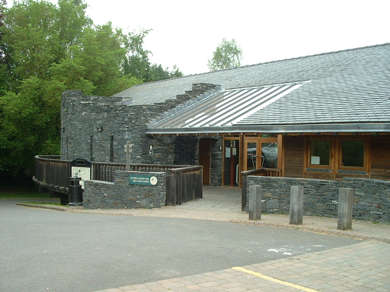 Eigen opname